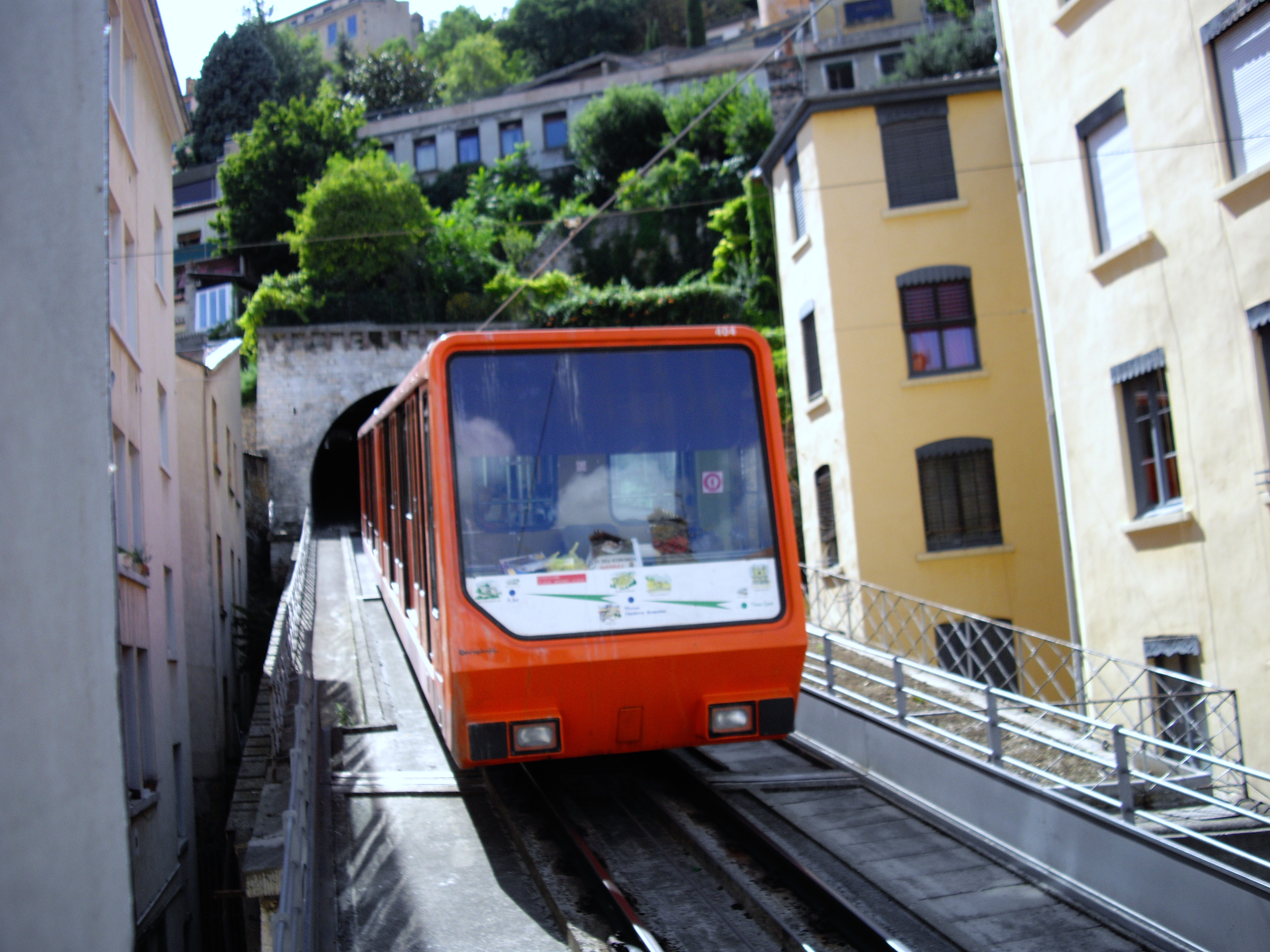 Le funiculaire Saint Just arrive à son terminus, Vieux Lyon Cathédrale Saint Jean.